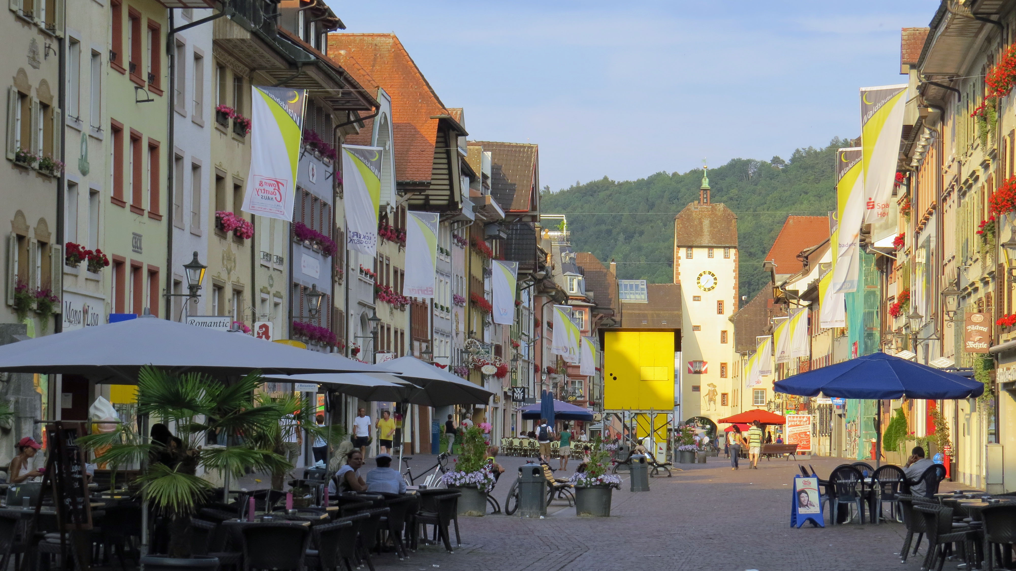 Kaiserstr. mit Oberem Tor in Waldshut